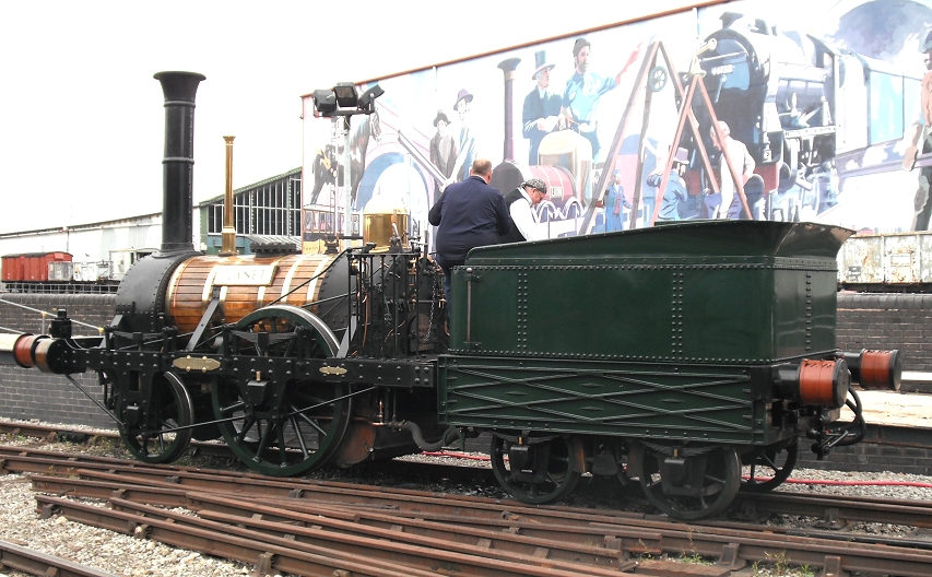 Planet